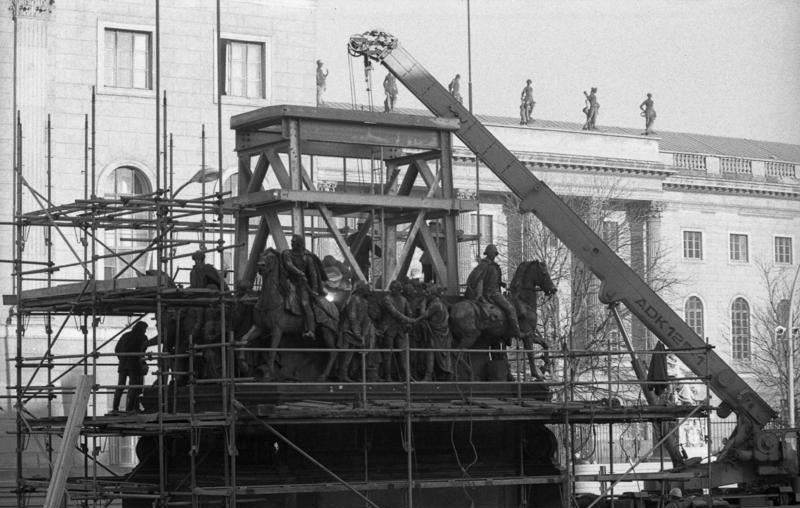 Berlin, Denkmal Friedrich II. ADN-ZB/Schindler/27.11.80/Berlin: Zügig voran gehen die Arbeiten zur Aufstellung des Denkmals Friedrich II., eines Meisterwerkes des Bildhauers Christian Daniel Rauch, im Lindenforum. Gegenwärtig werden bereits die Bronzefiguren auf dem Denkmalsockel montiert.